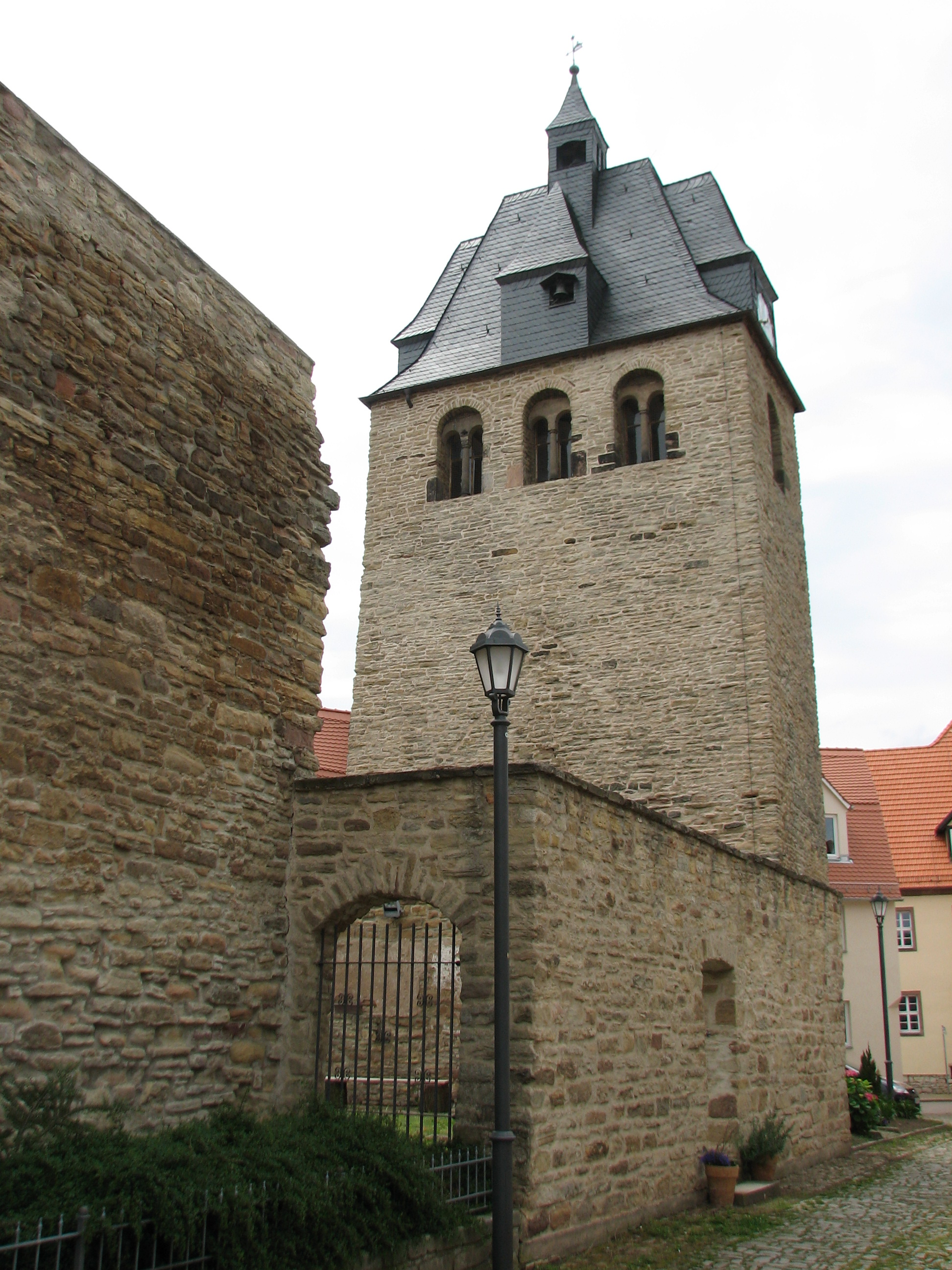 Allstedt, Wigbertikirche. Das Kirchenschiff ist eine sanierte Ruine, vom Kirchturm ist ein Rundblick möglich.